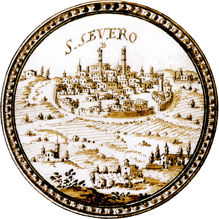 Francesco Cassiano de Silva, Veduta di San Severo, nel Regno Napolitano anotomizzato (1708)